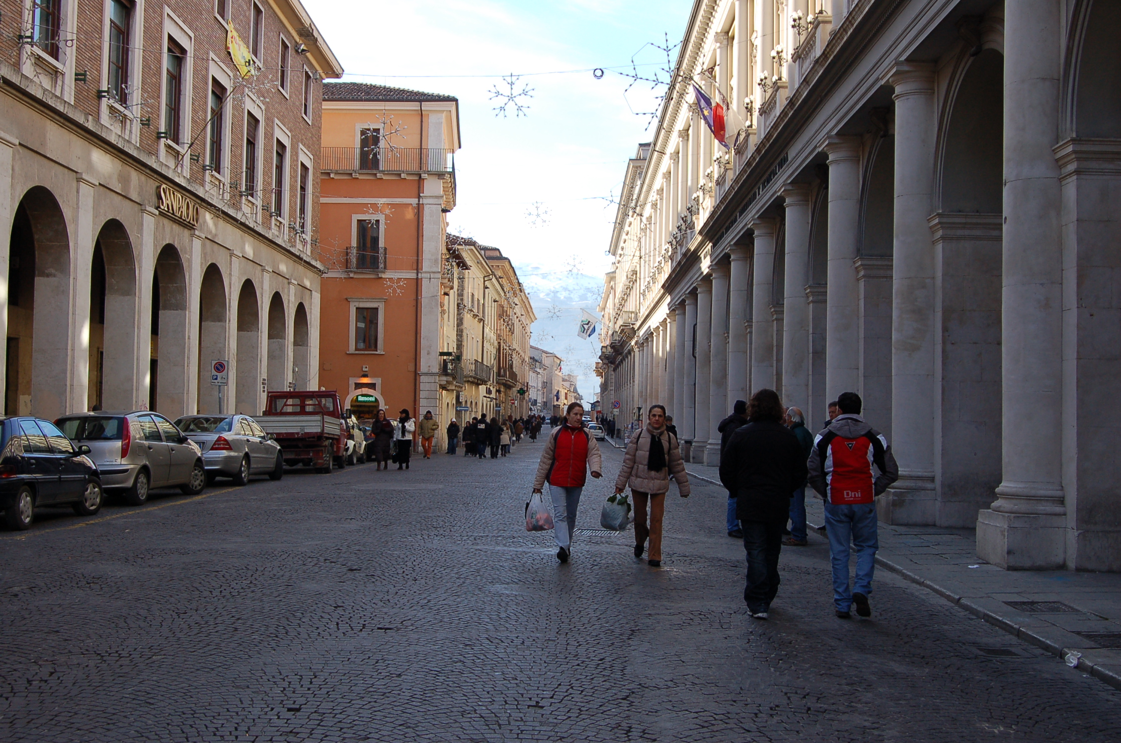 L'Aquila, Italia